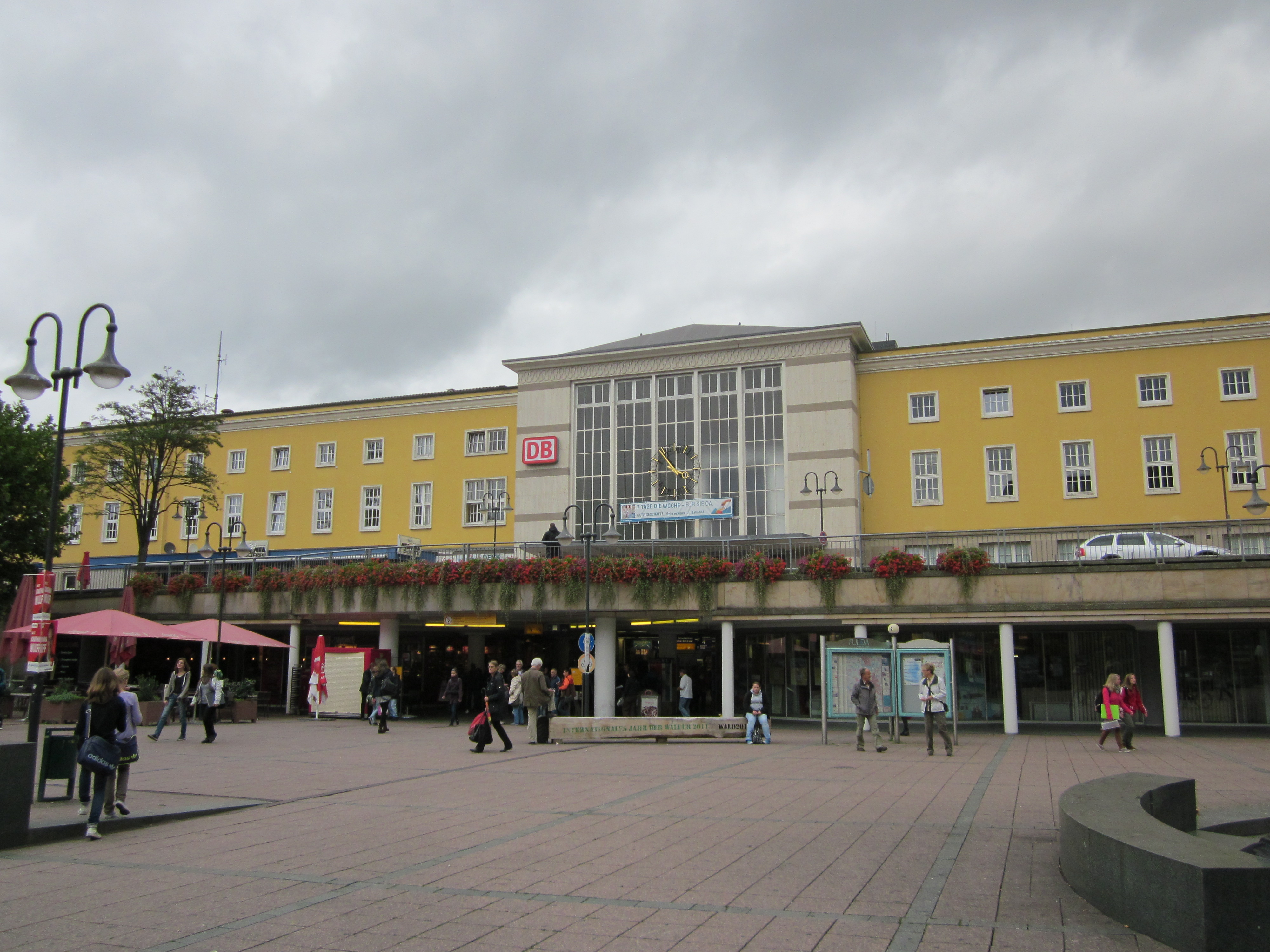 Der Bahnhof in Fulda wurde 1946-54 auf den Grundmauern des zerstörten Vorgängerbaus errichtet.